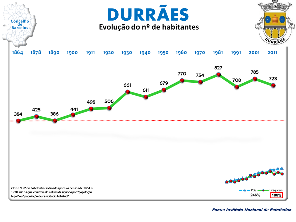 anos1864/2011